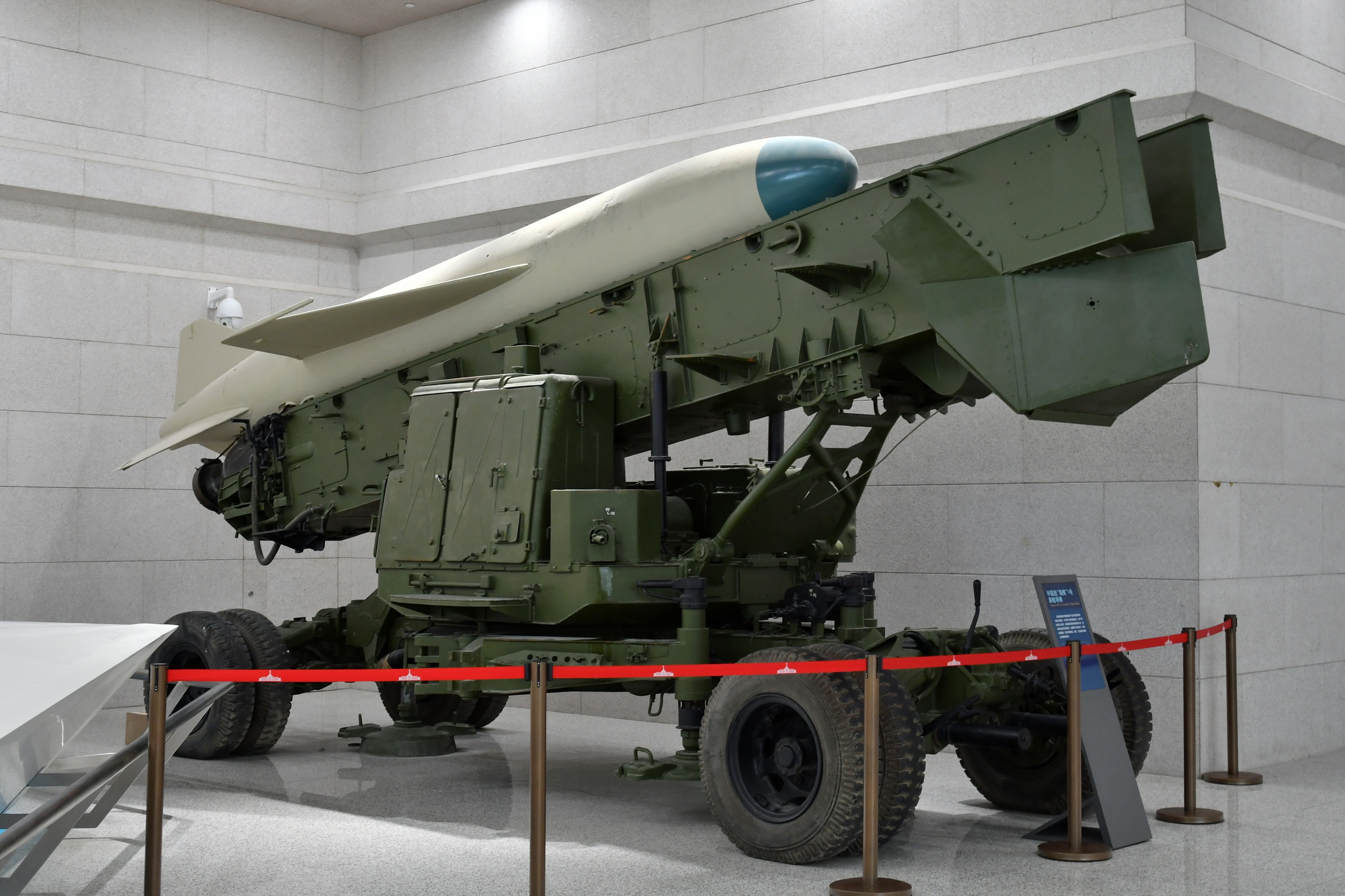 “海鹰”1号岸舰导弹发射车，拍摄于中国人民革命军事博物馆。